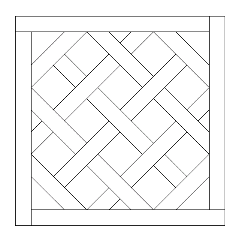 Один из видов рисунка модульного паркета